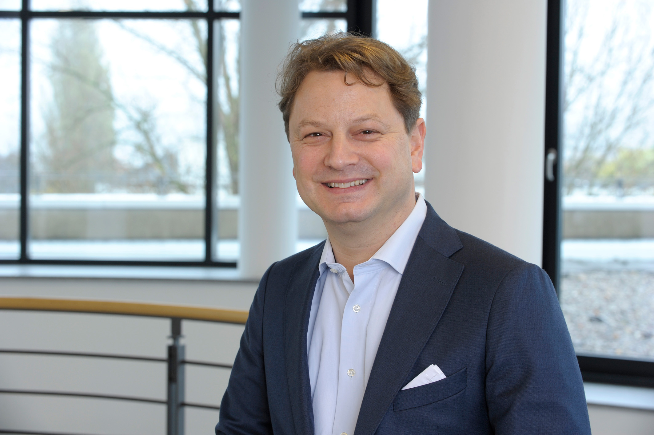 Prof. Dr. Michel Clement